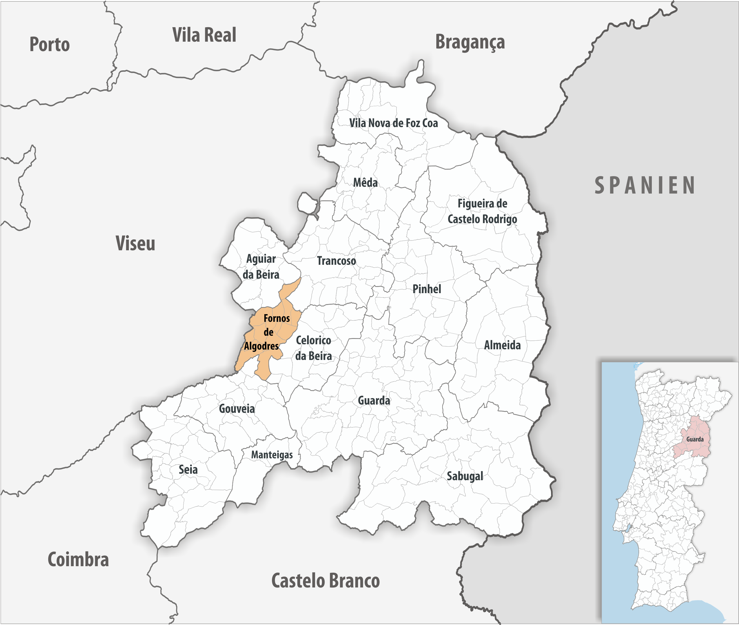 Kreis Fornos de Algodres